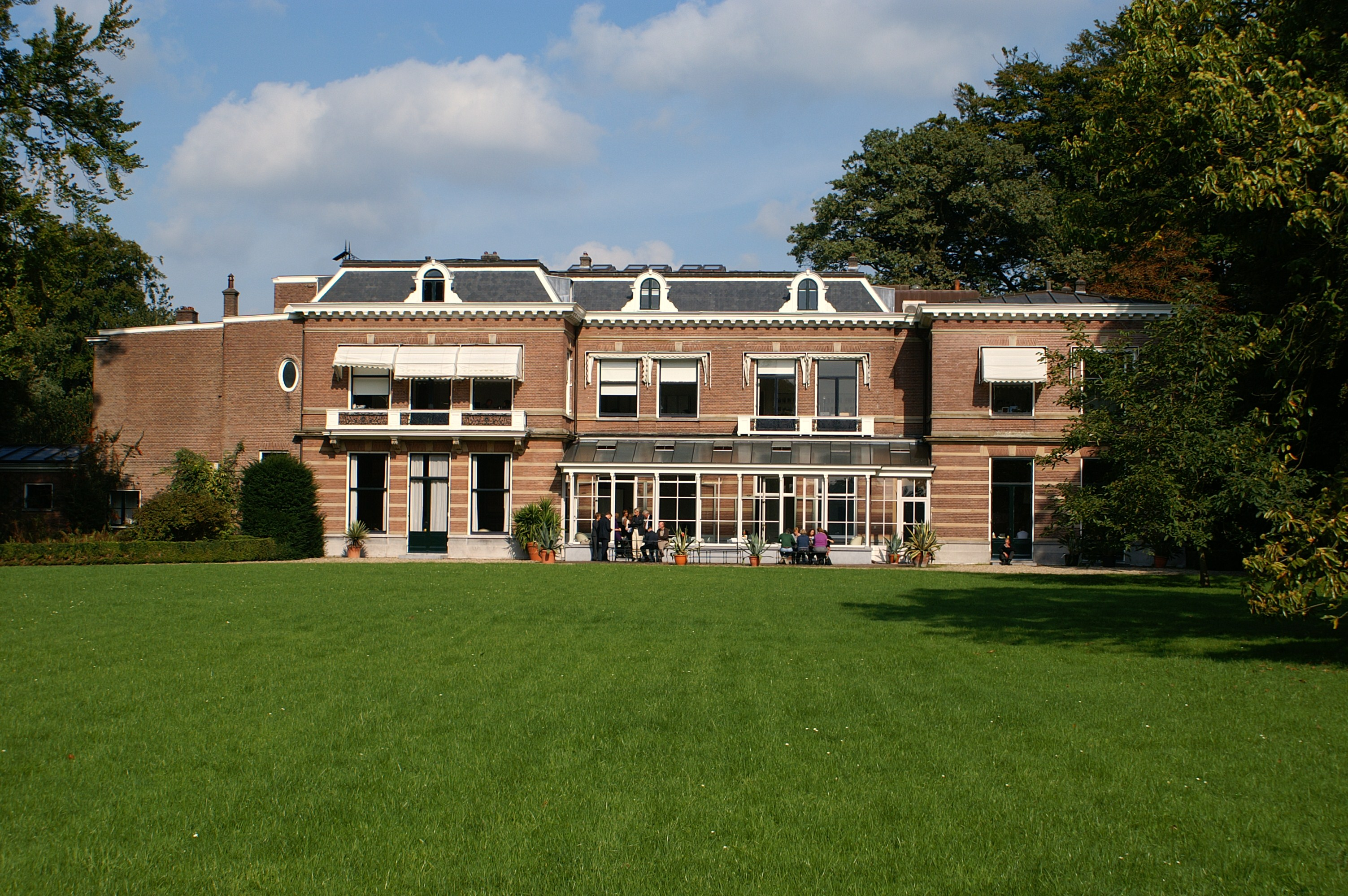 Huis Oostbroek te De Bilt, achterzijde.